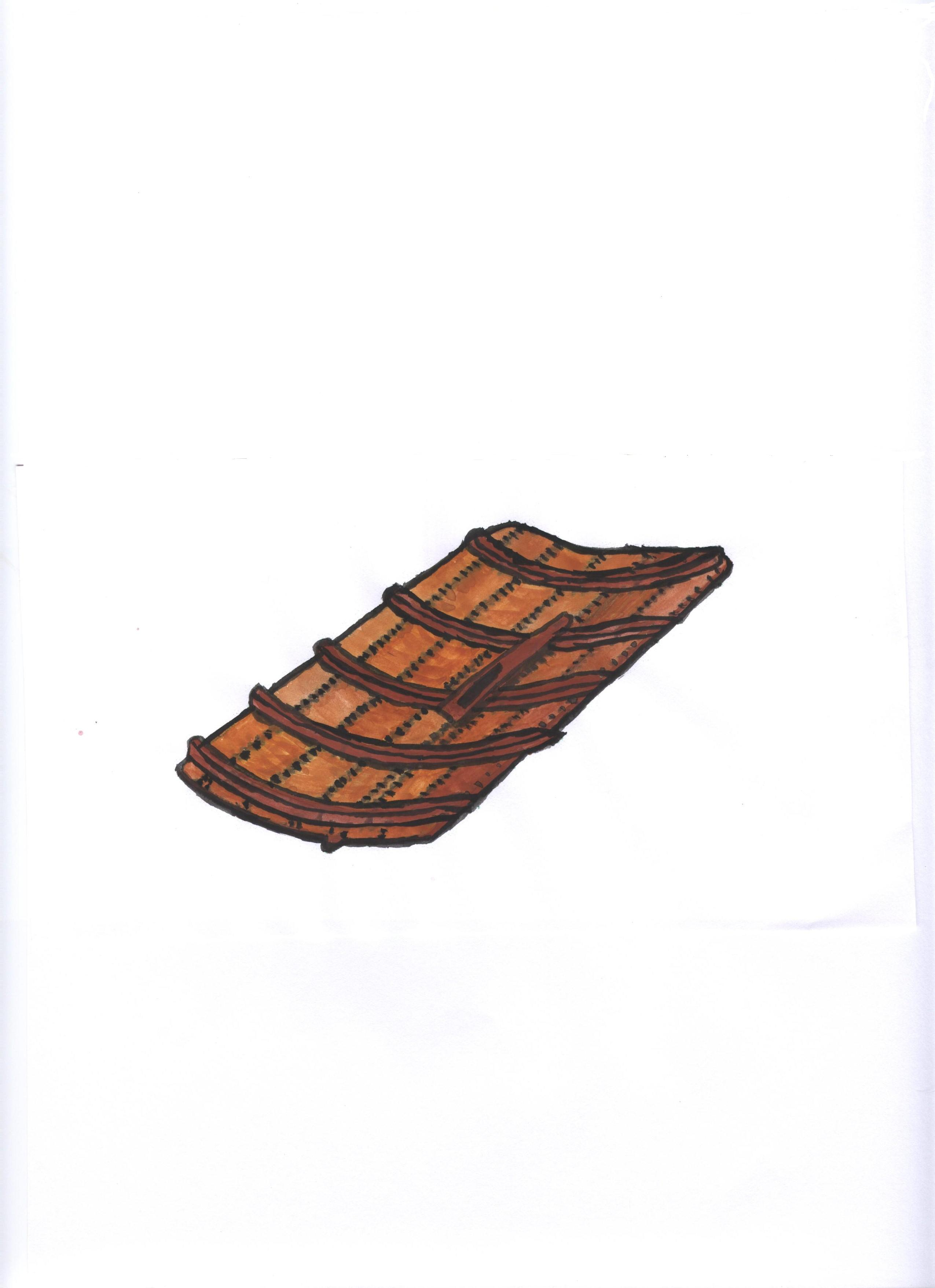 Coque cousue d'un bateau étrusque du VIé siècle avJ.-C.